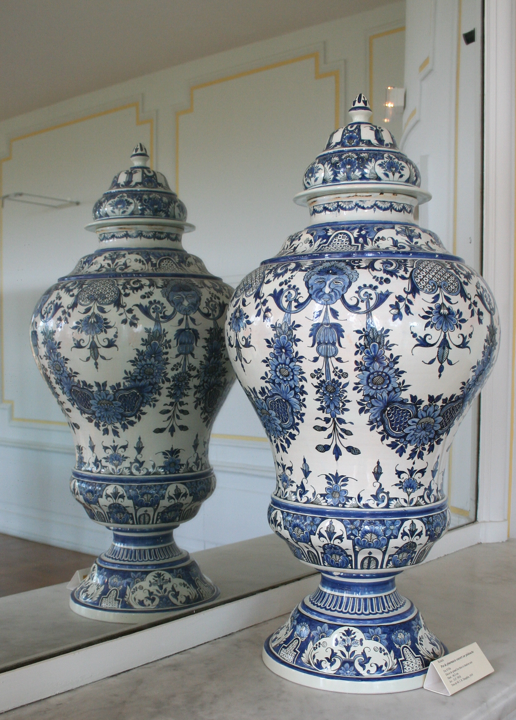 Apothekergefäß, Fayence aus Rouen, Ende 17. Jahrhundert, Marseille, Musée de la faïence.